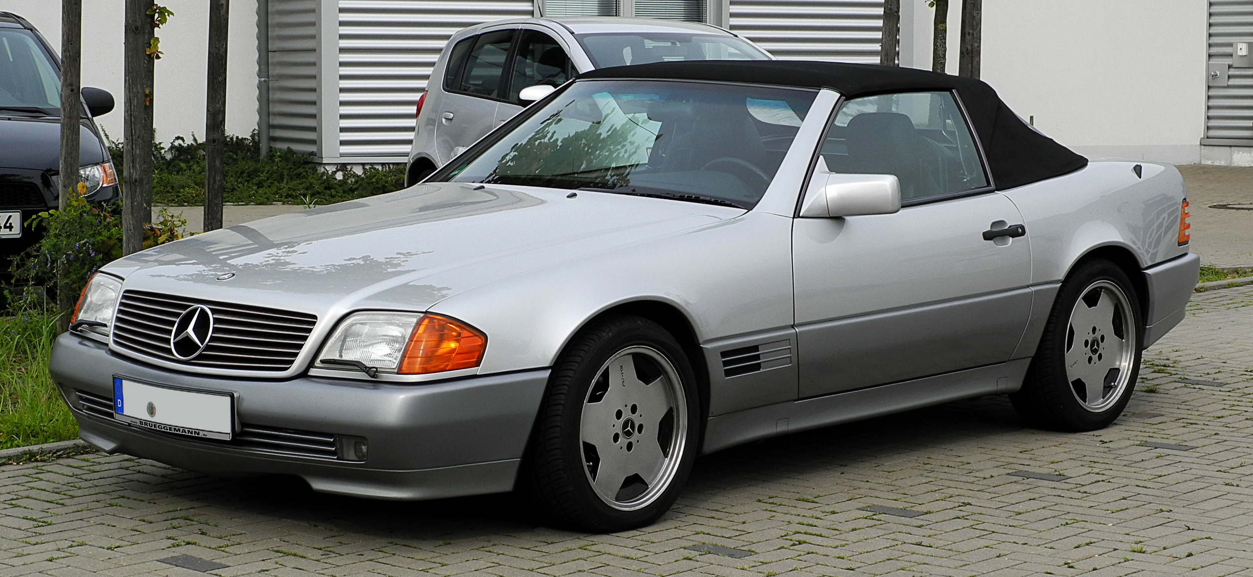 Mercedes-Benz SL-Klasse (R 129)